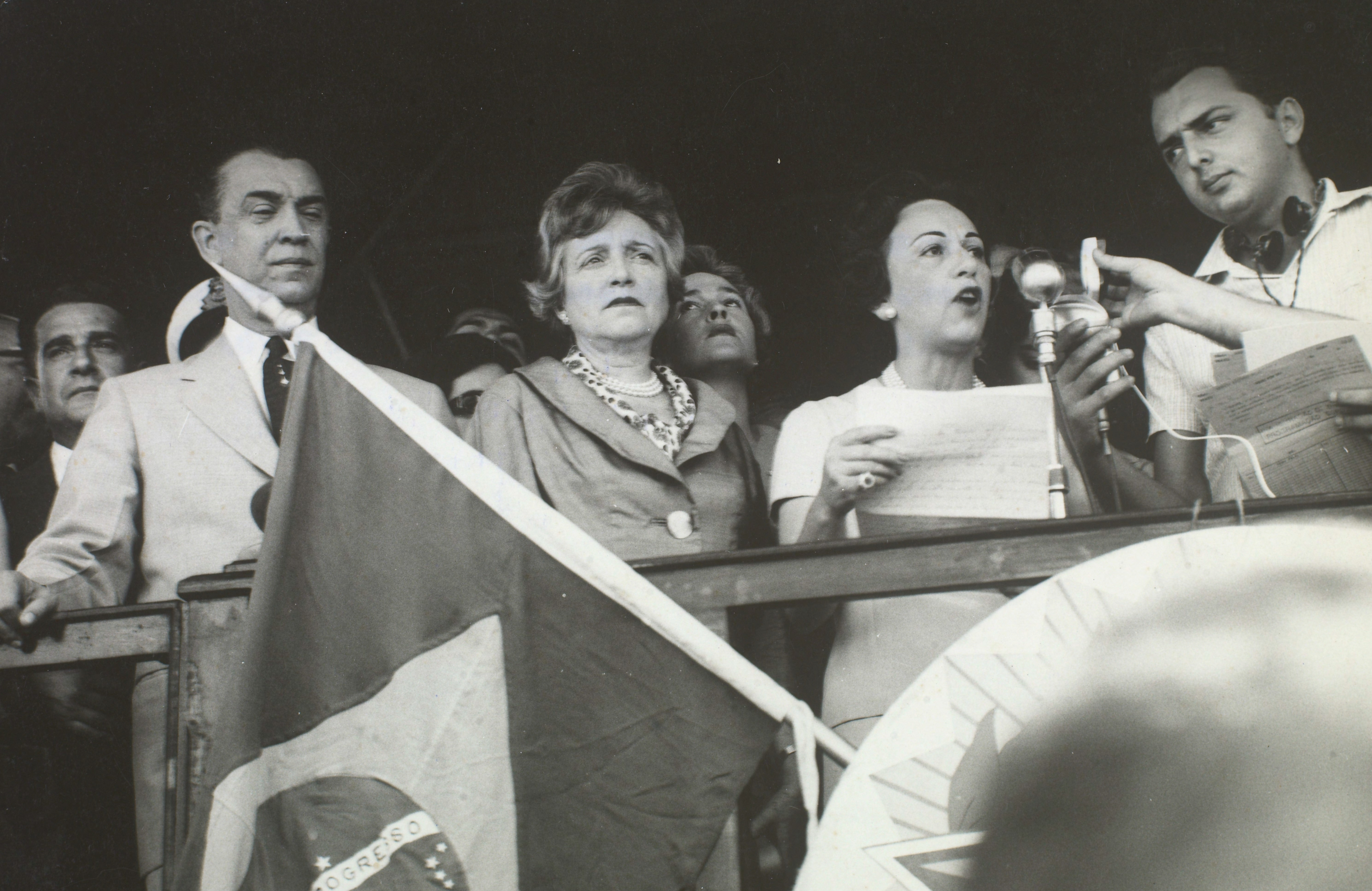 Fotografia do Fundo Correio da Manhã, sob a guarda do Arquivo Nacional.